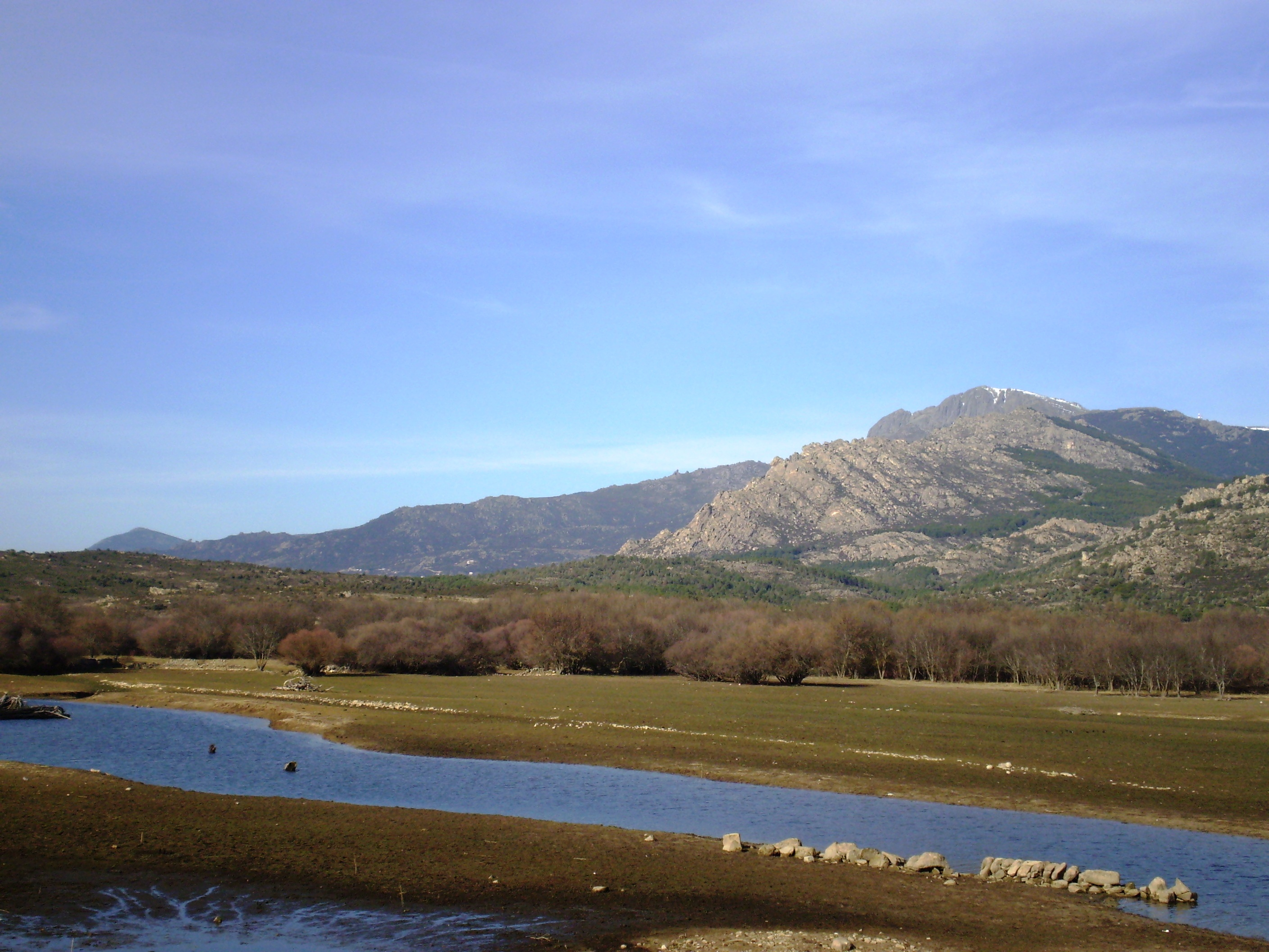 Samburiel River, in Manzanares el Real, Madrid, Spain